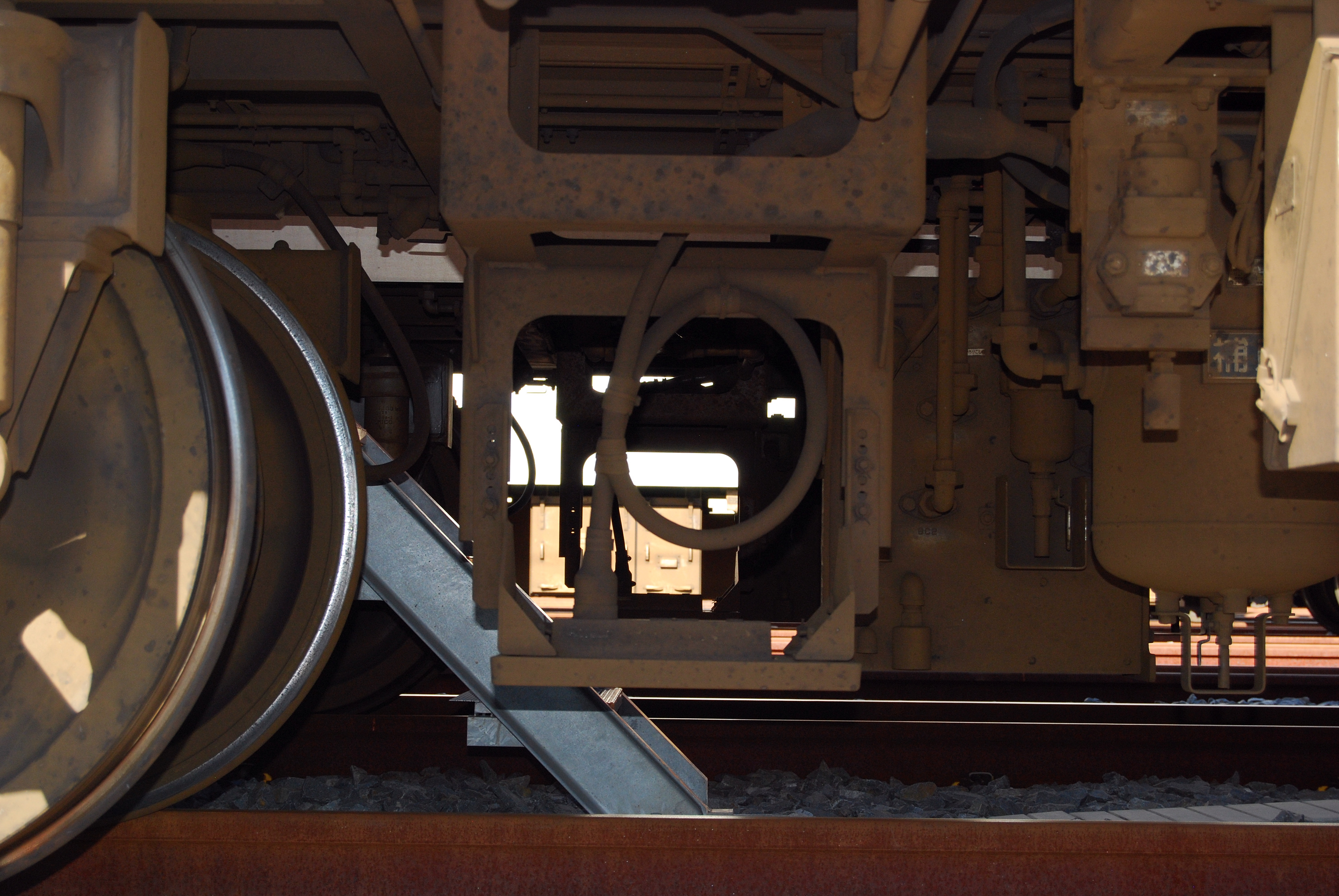 首都圏新都市鉄道TX-1000の床下にあるATO車上子（つくばエキスプレス総合基地祭りでの 車両基地開放にて撮影）